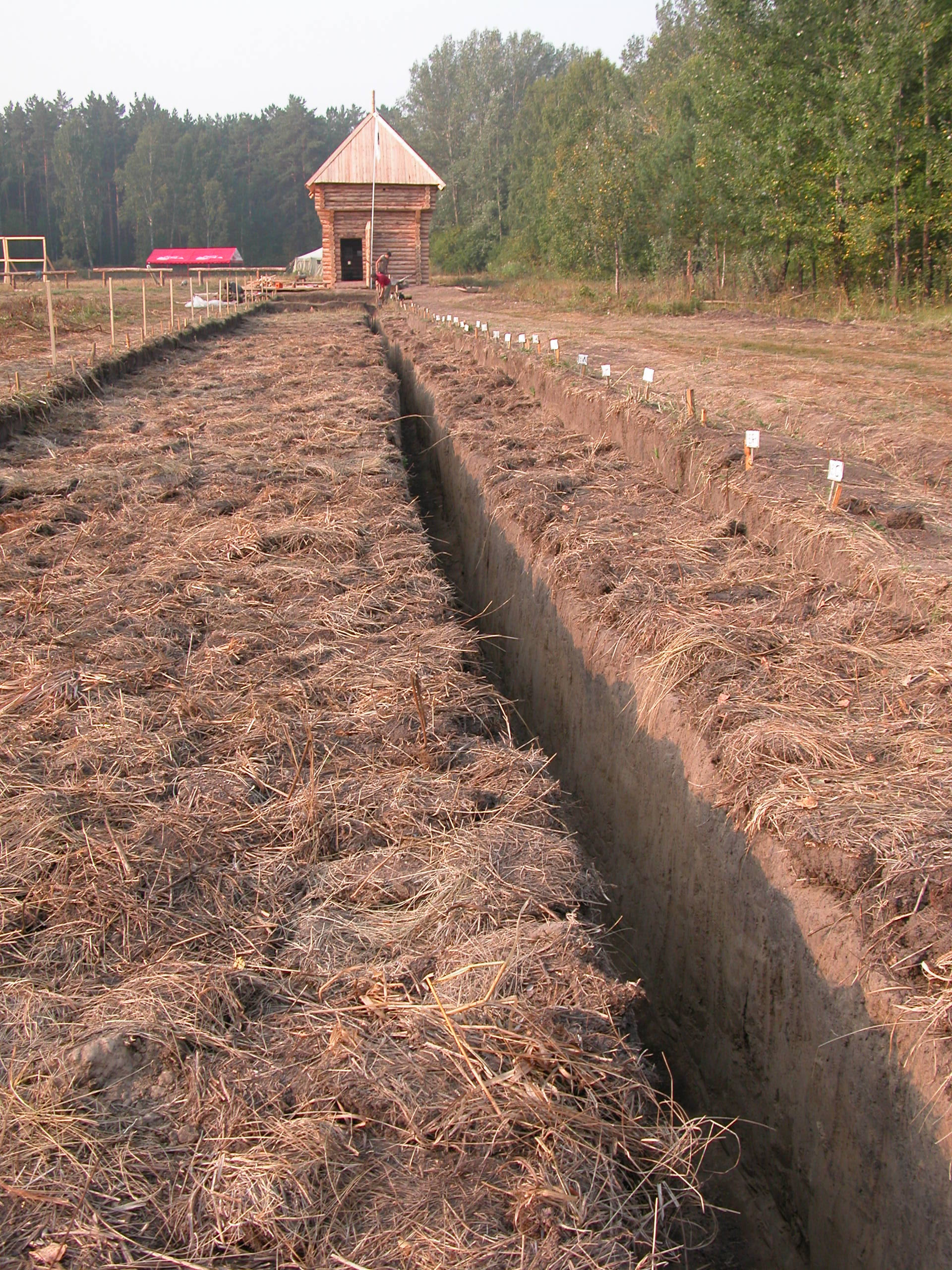 Умревинский острог. Канавка западного тына